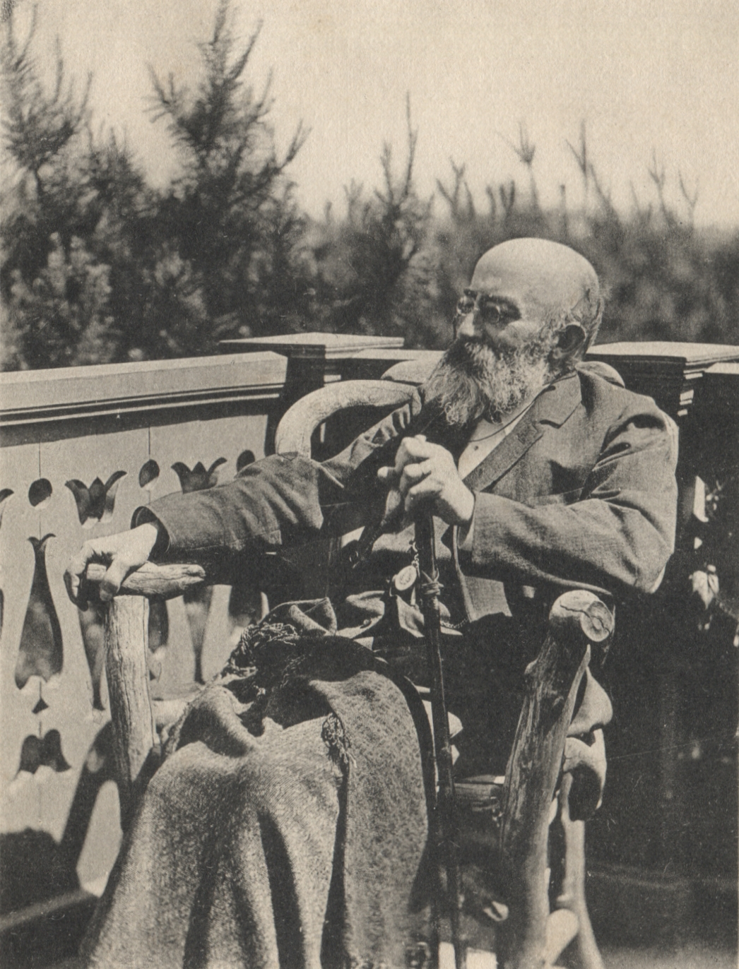 Sebastian Hensel, 1890er Jahre, Charlottenburg-Westend, Ahornallee 40